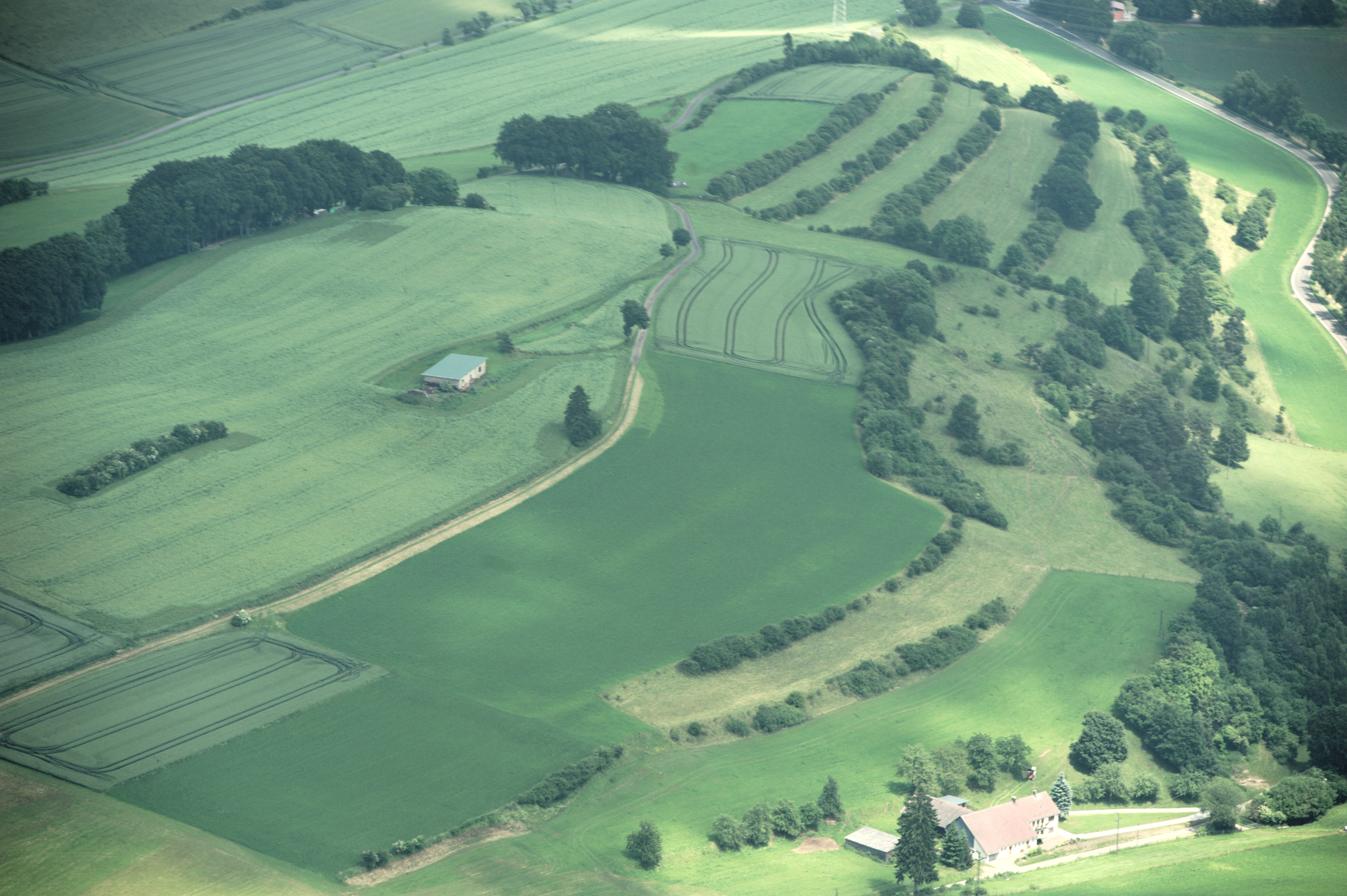 Fotoflug Sauerland-Ost, Glockenrücken südwestlich von Udorf; NSG Udorfer Mühle; unten: Im Pansgrund bei Udorfer Mühle The making of this document was supported by the Community-Budget of Wikimedia Germany.